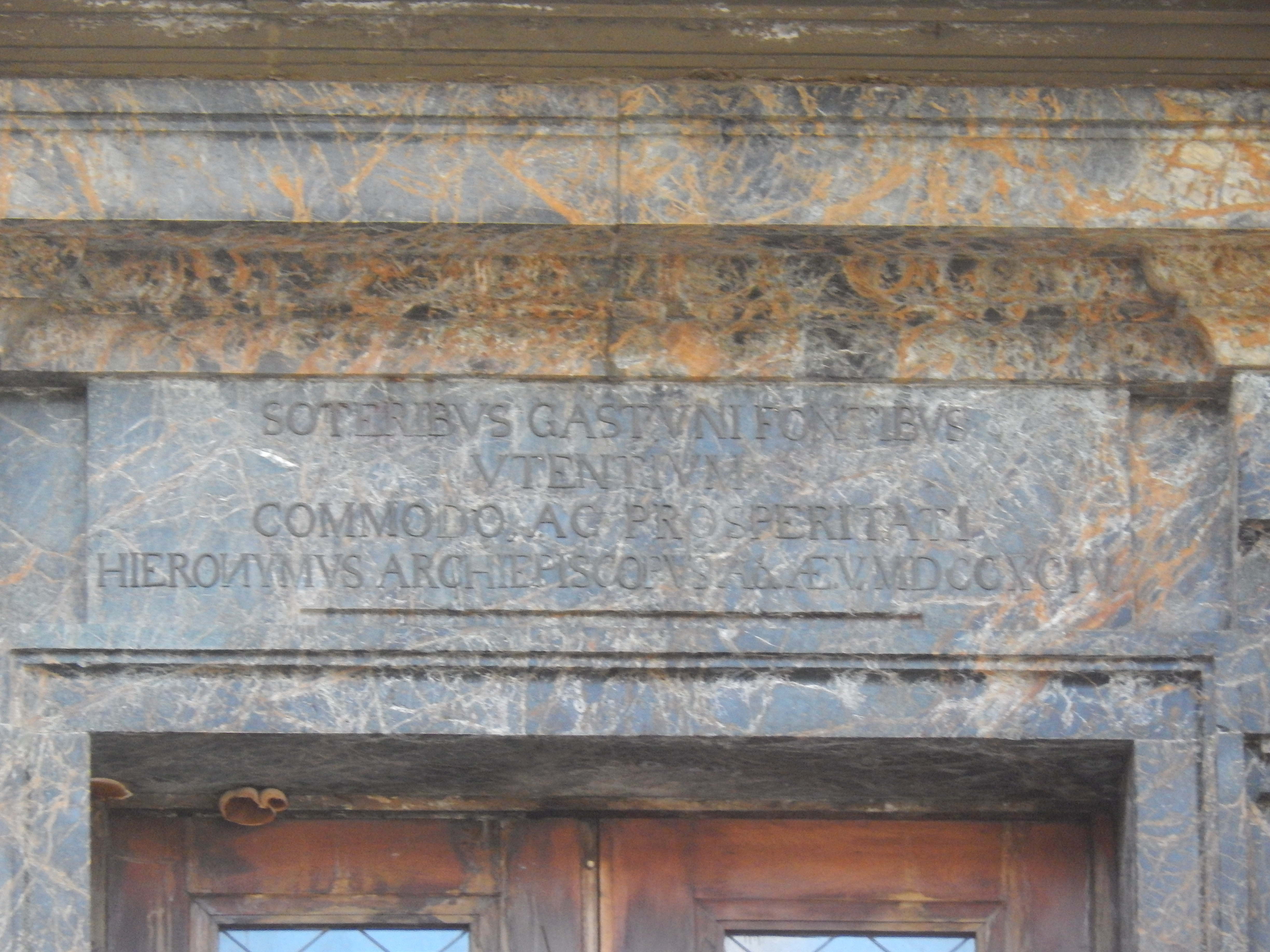 Haus Badeschloss in Bad Gastein